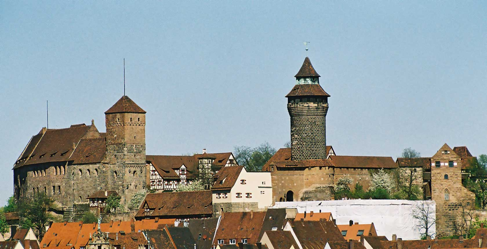 Nürnberger Burg